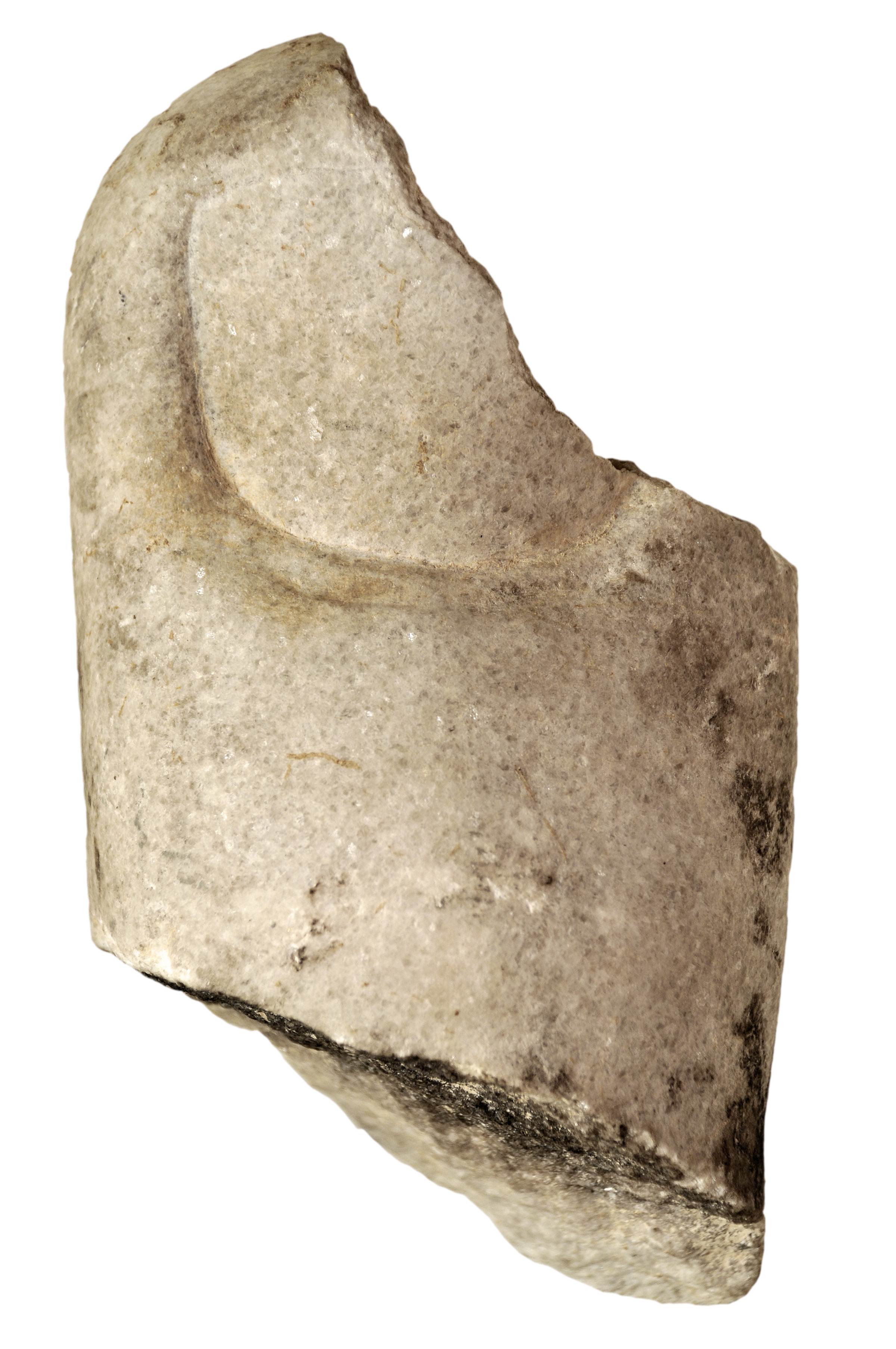 Fragment d'un dit del peu esquerre d'una possible estàtua de l'emperador August que presidiria el temple del recinte de culte del Fòrum Provincial de Tàrraco. MNAT CAT-00-3146-1